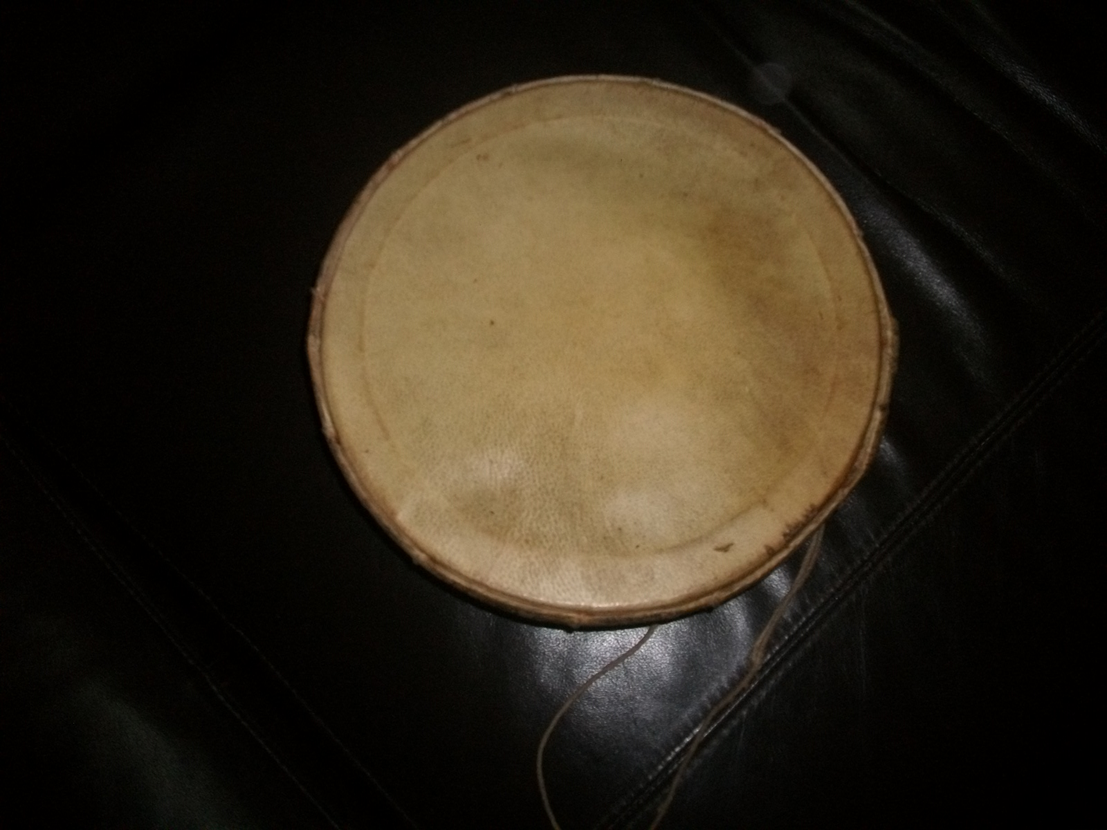 Instrumento de percusion arabe